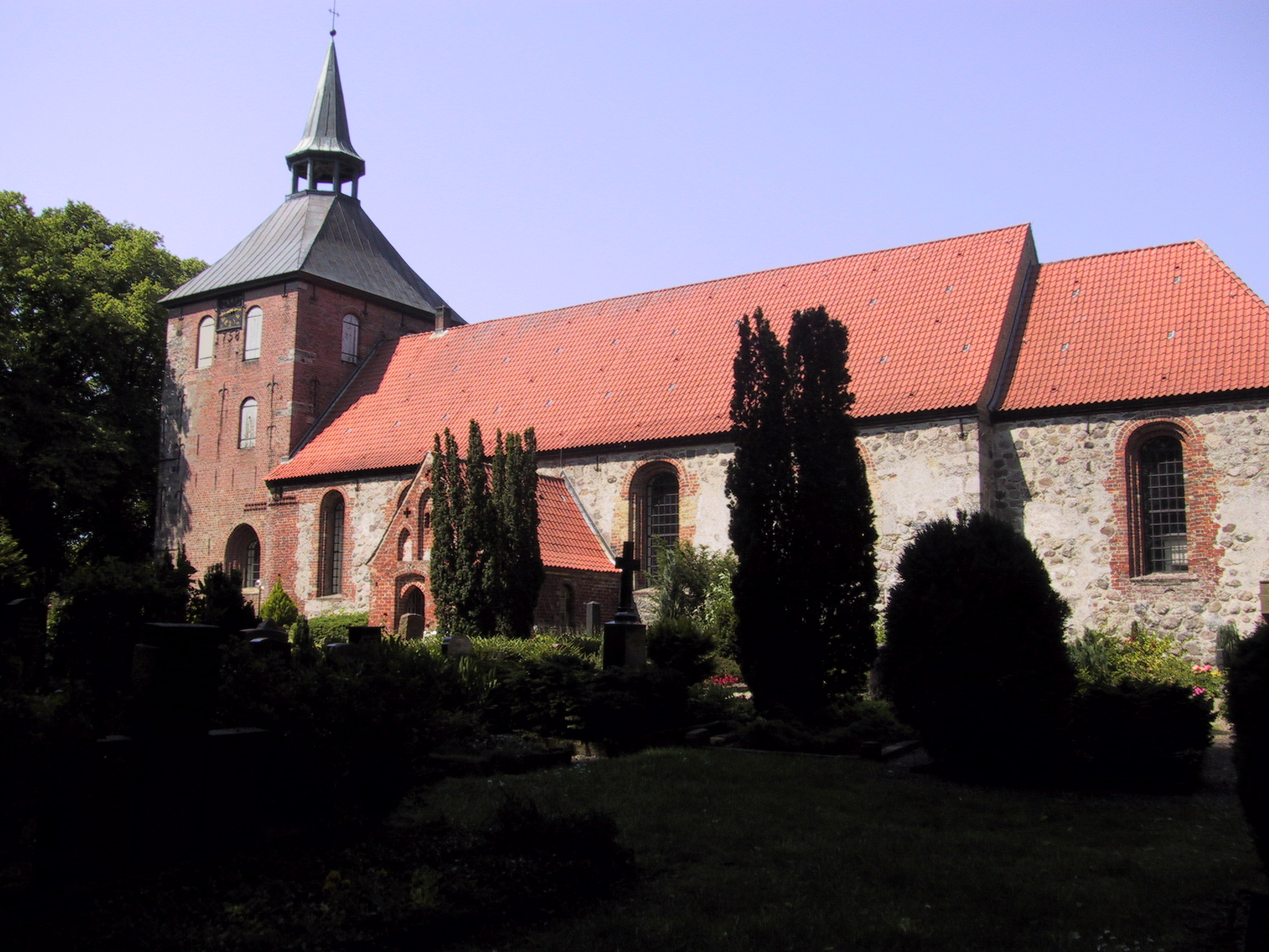 St. Marienkirche in Grundhof, Südseite